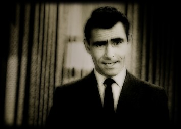 Autore: Meltwater Descrizione: immagine di Rod Serling, creatore della serie tv "Ai confini della realtà" Origine: Flickr URL